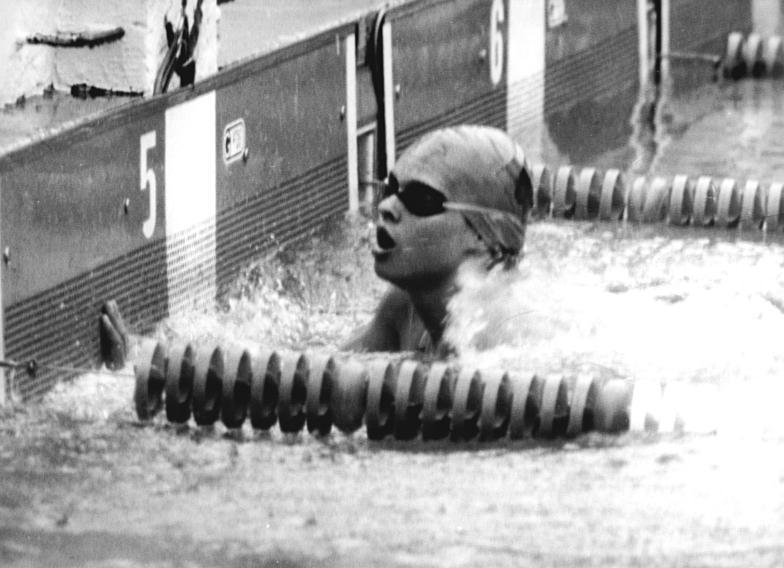 Petra Thümer ADN-ZB Gahlbeck 10-7-77 Leipzig: 28. DDR-Meisterschaft im Sportschwimmen-4. Tag-Anschlag in neuer Weltrekordzeit. Die 16jährige Olympiasiegerin und Titelverteidigerin über 800 m Freistil der Damen, Petra Thümer (SC Karl-Marx-Stadt), verbesserte ihre eigene Weltrekordmarke (8:37,14 min) auf 8:35,04 min.